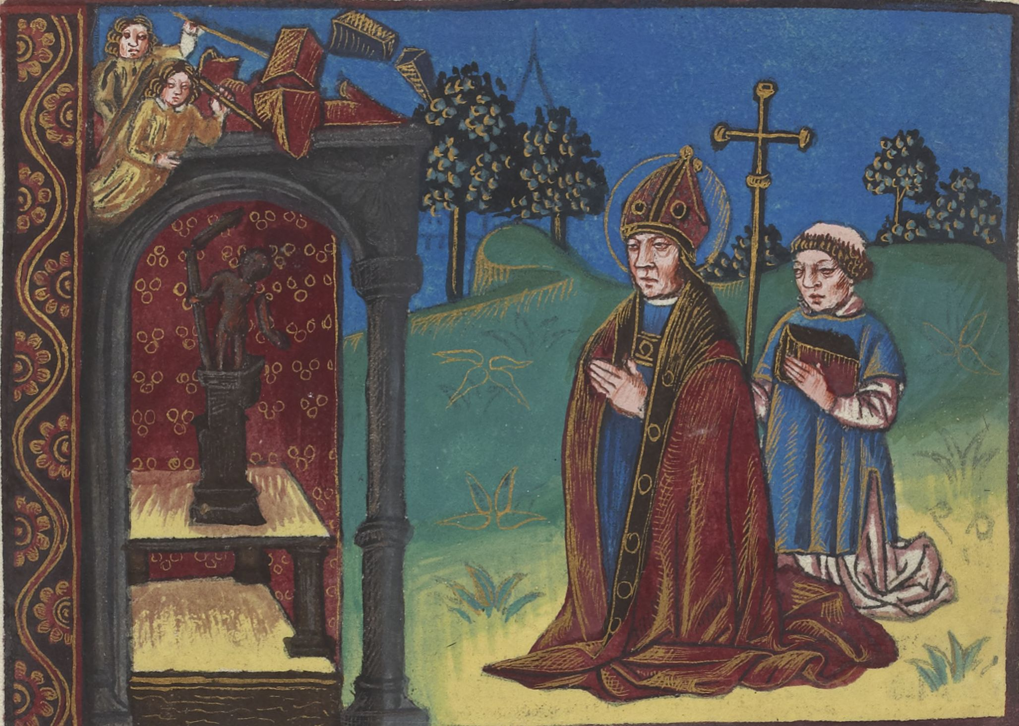 Miniature représentant la destruction du temple d'Amboise, extraite de "La vie et miracles de monseigneur saint Martin, translatee de latin en francoys"